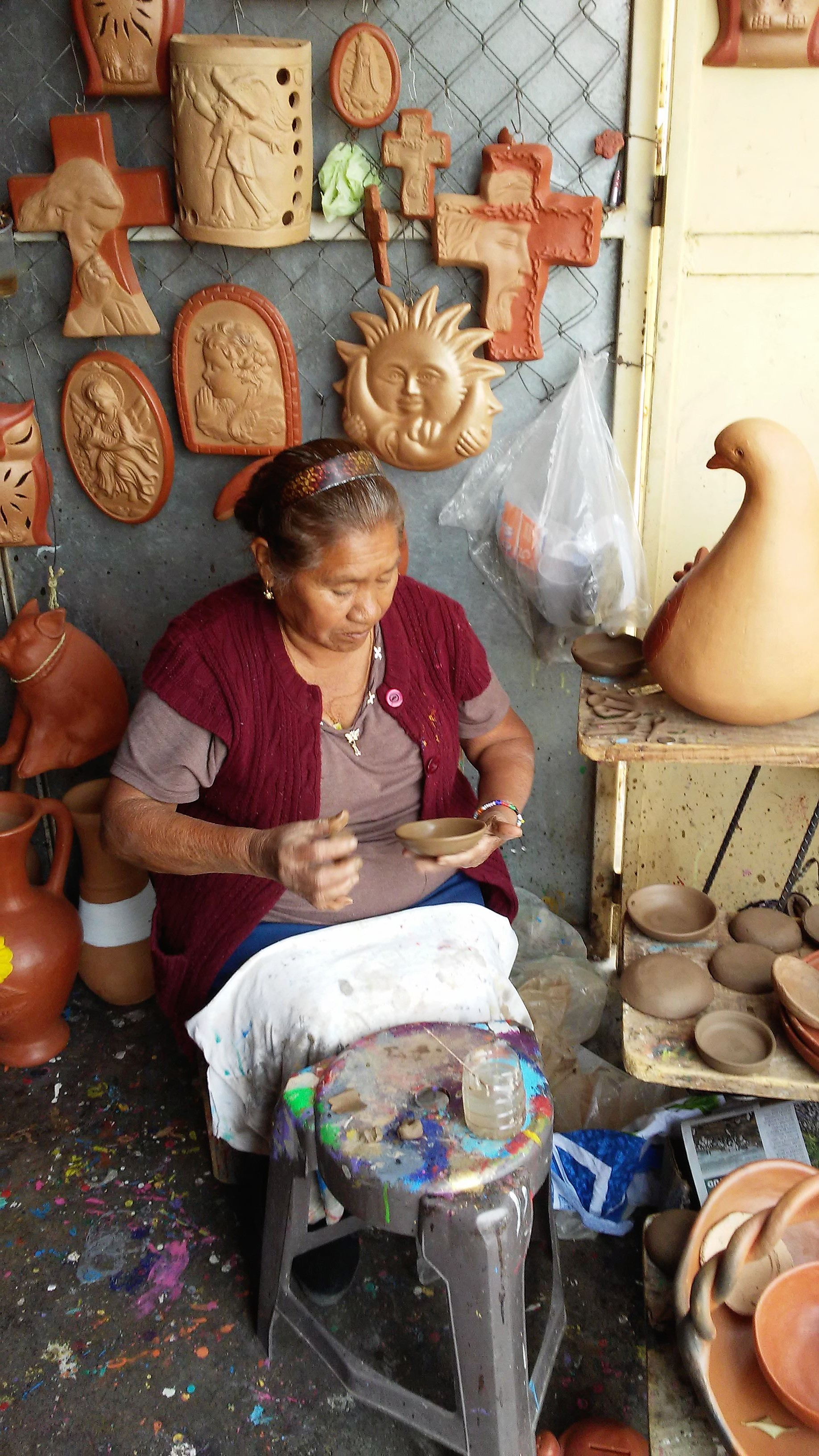 Artesana del barro, Acatlán de Osorio, Estado de Puebla, Mexico, trabajando y vendiendo sus artesanías.